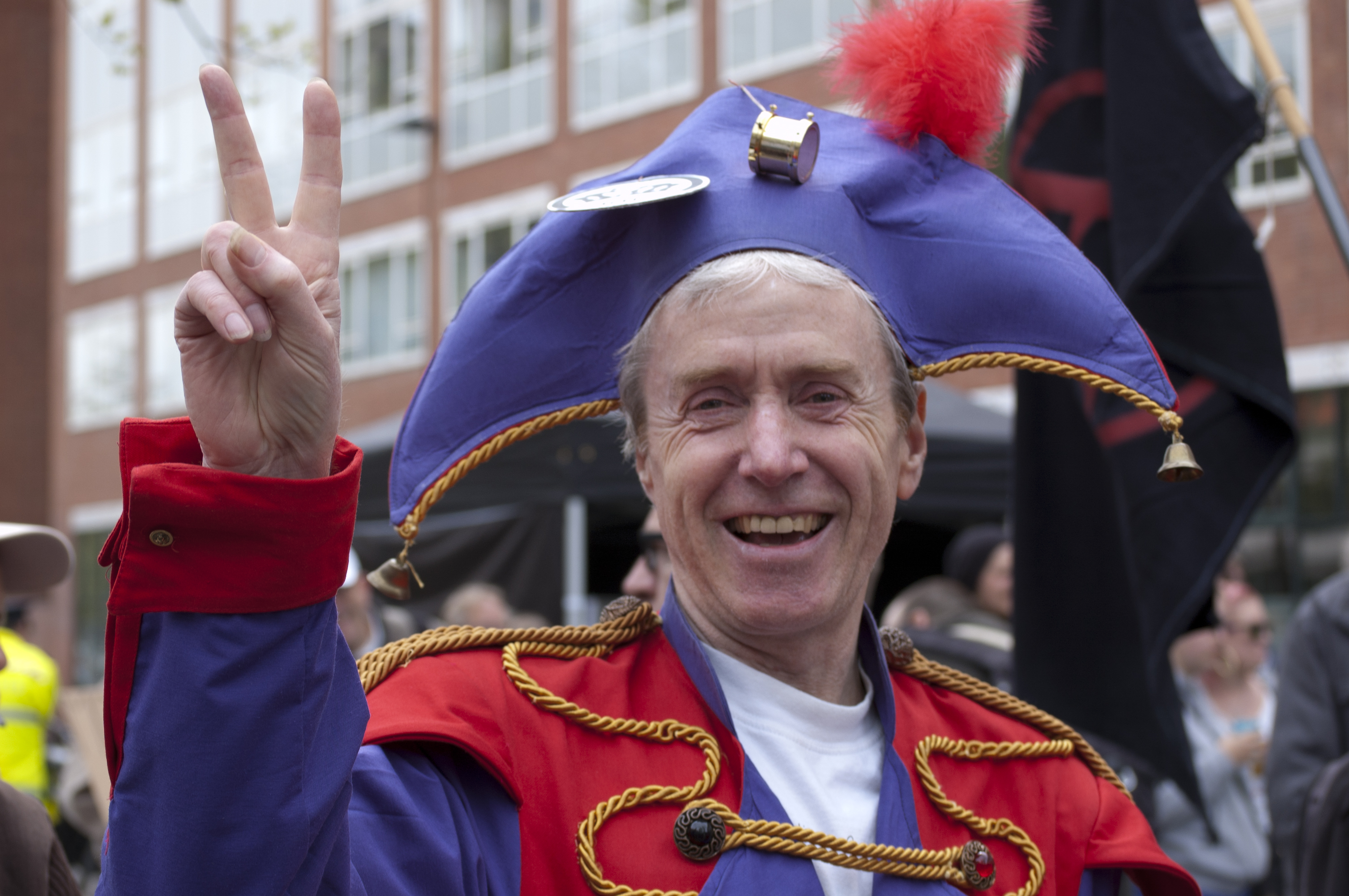 Het Nieuw Republikeins Genootschap (NRG) meent dat het koningshuis niet meer van deze tijd is en demonstreerde daarom op 30 april 2013 tegen 'de monarchie'.